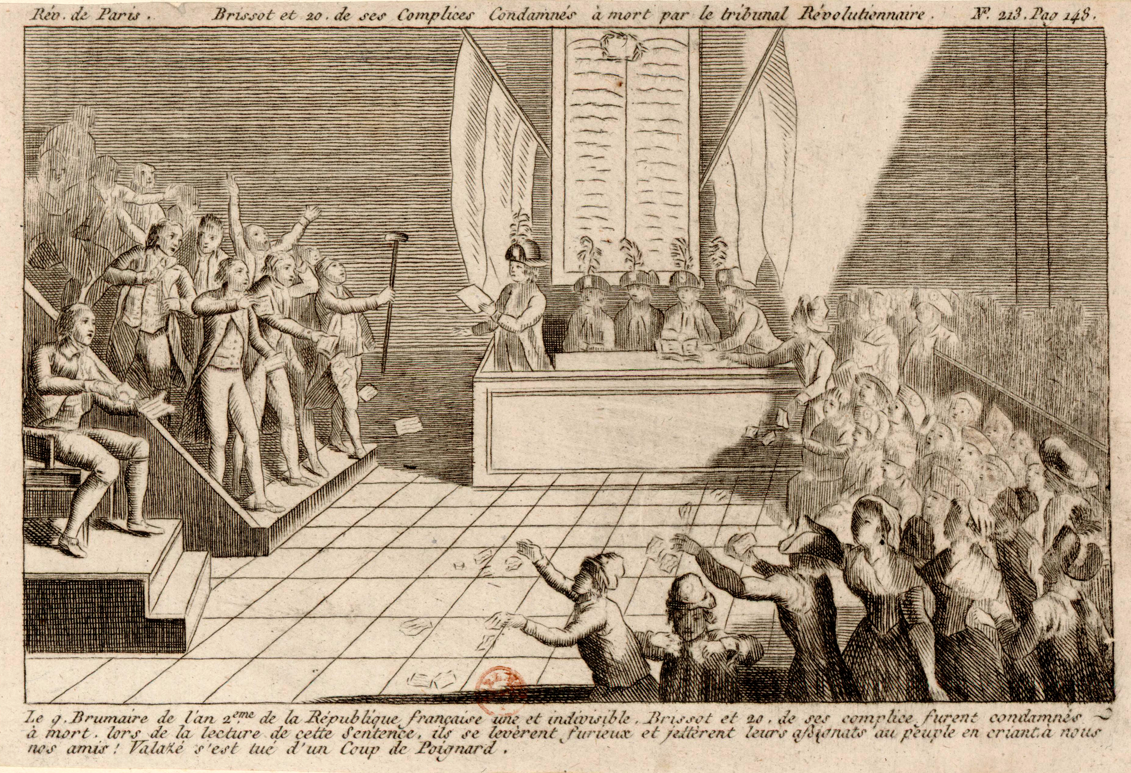 Brissot et 20 de ses complices condamnés à mort par le tribunal révolutionnaire, estampe.